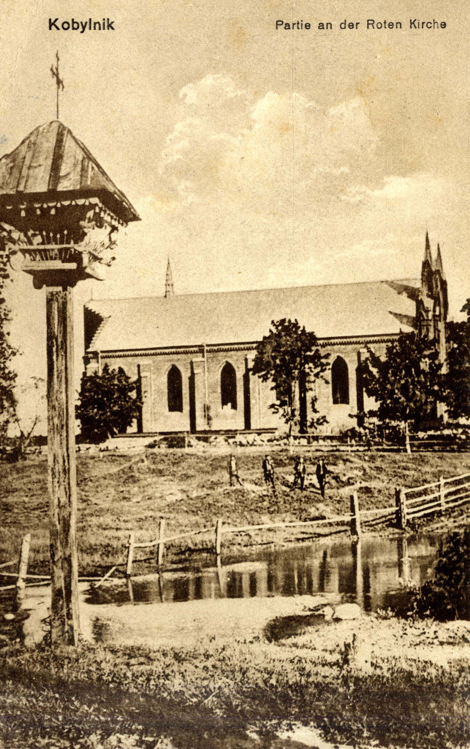 Беларуская (тарашкевіца): Кабыльнік (Kabylnik), калічка на вуліцы Віленскай (vulica Vilenskaja) пры мосьце праз раку Малінаўку (Malinaŭka)